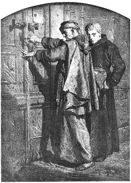 Zamknięcie kosciołów